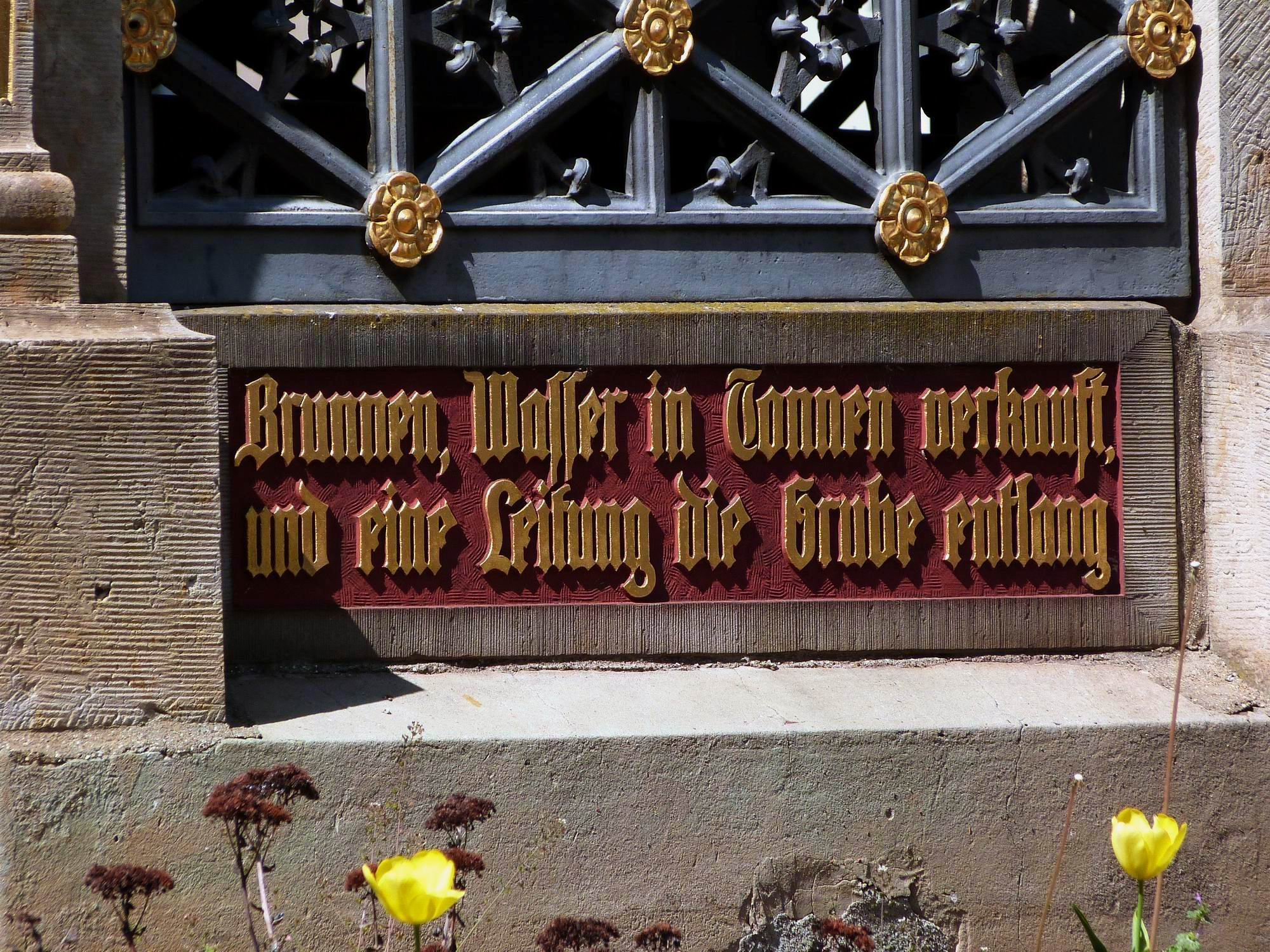 Wasserkunst